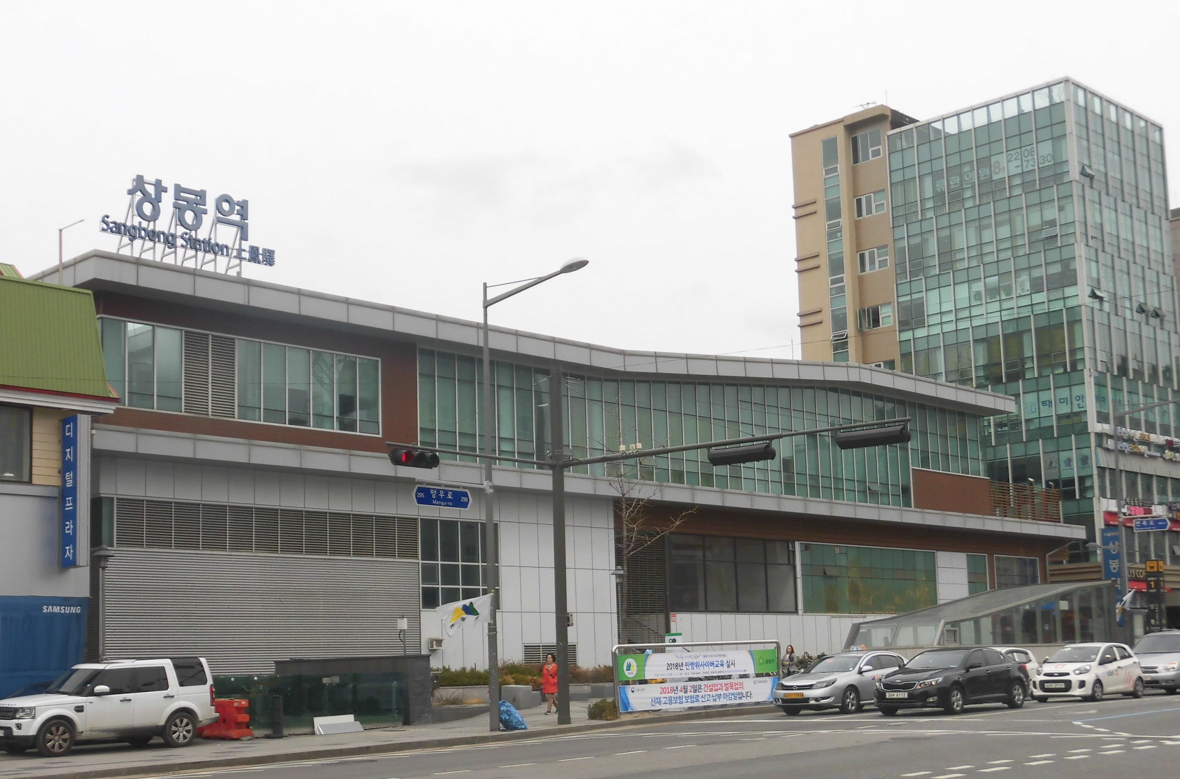 한국철도공사 상봉역